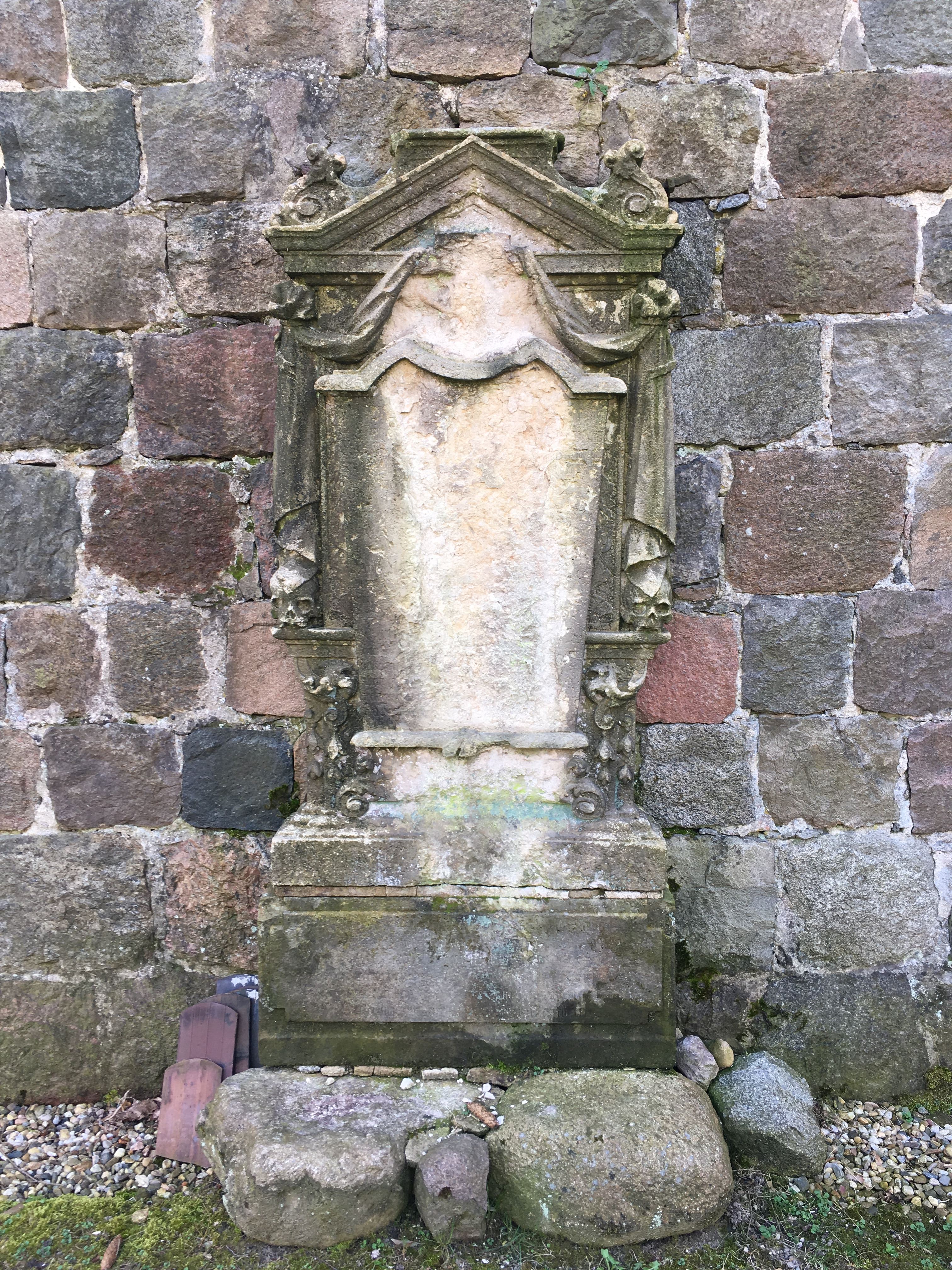 Die Dorfkirche in Kaltenborn bei Niedergörsdorf entstand in der ersten Hälfte des 13. Jahrhunderts aus Feldsteinen. Im Innern ist ein Kanzelaltar aus dem 19. Jahrhundert sowie eine Orgel von Johann Tobias Turley.